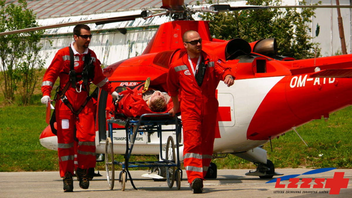 Záchranná akcia